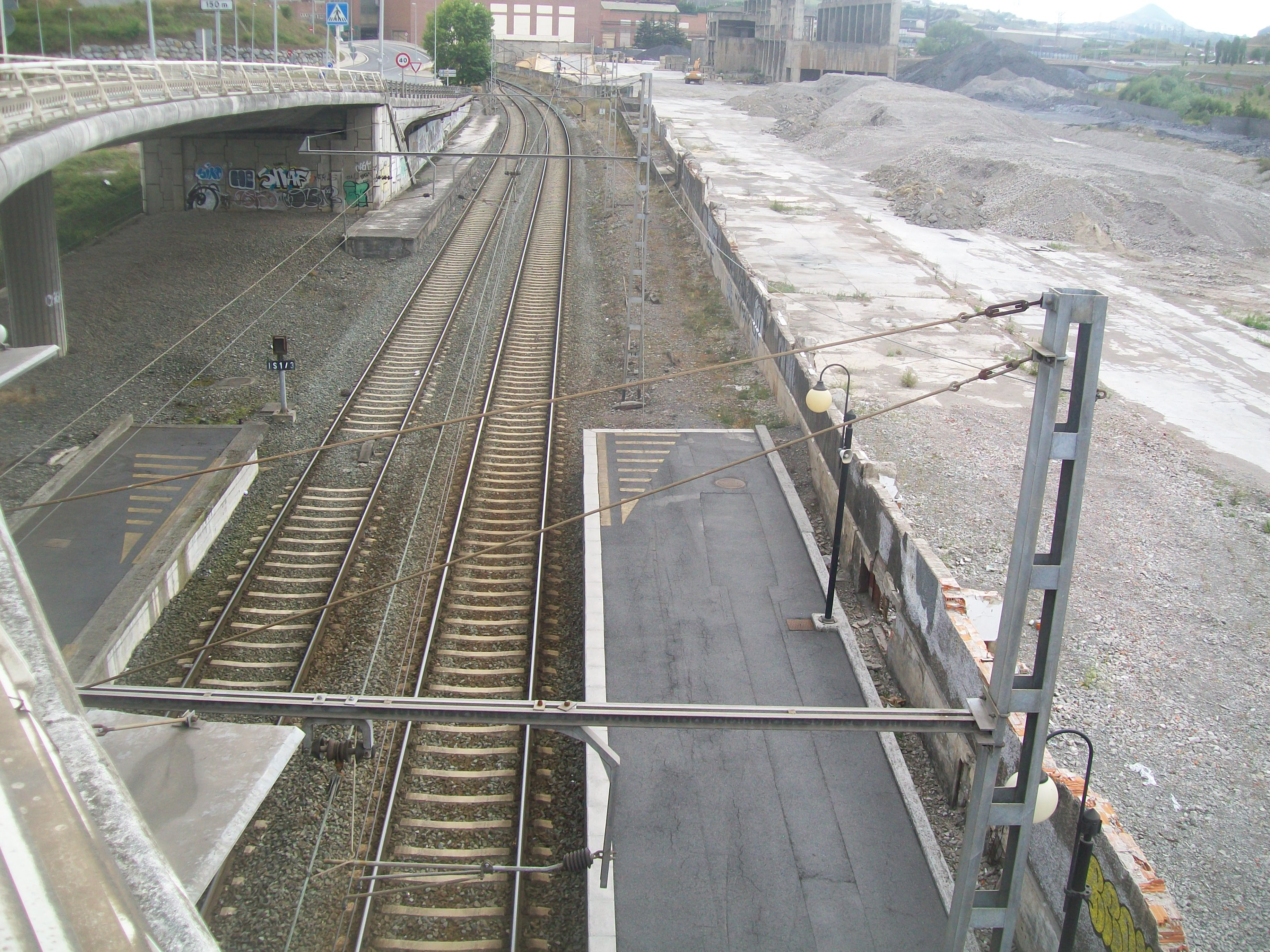 Detalles de lso andenes de la estación de Galindo